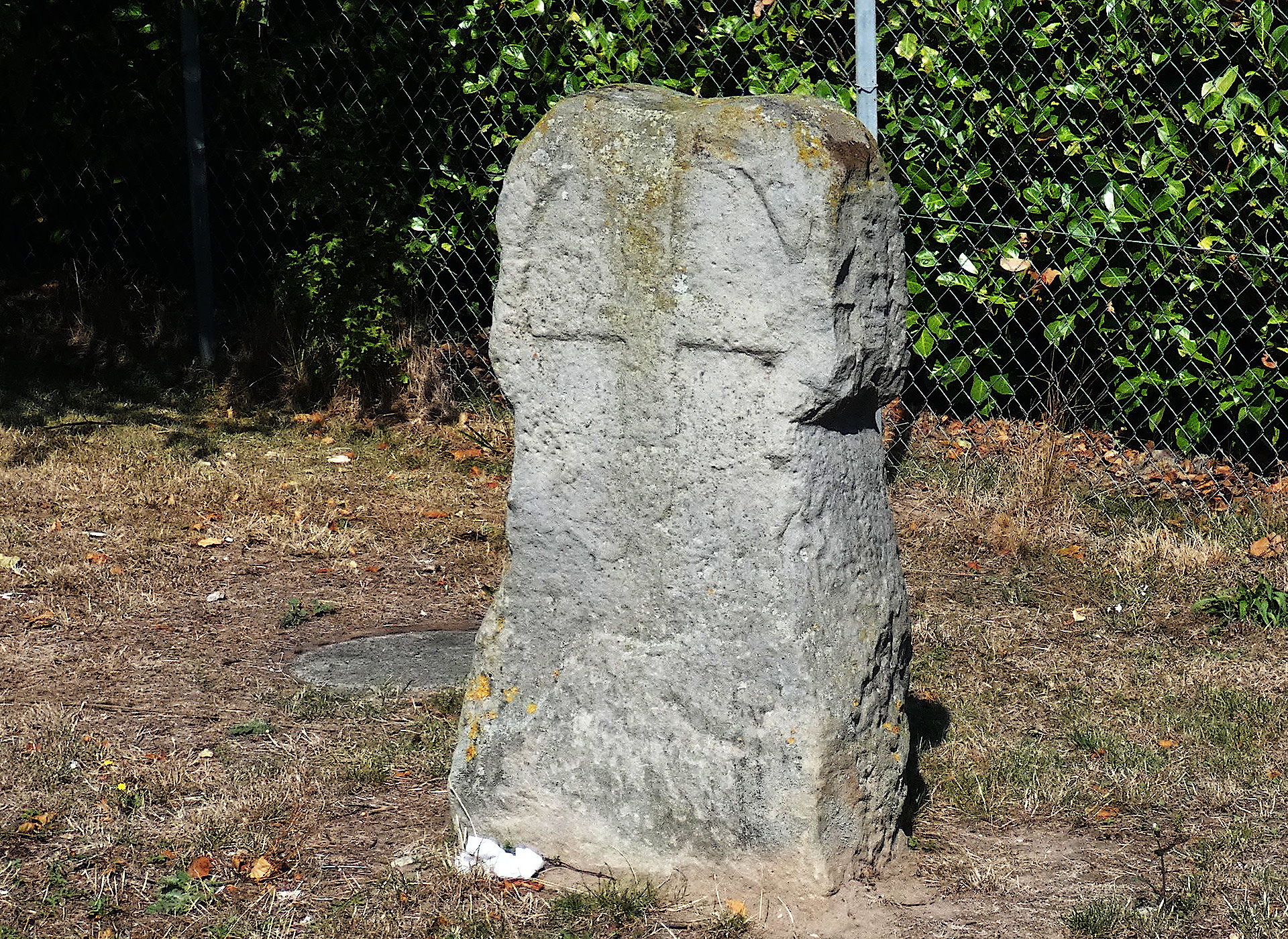 Der Siebstein oder Siebmacherstein ist ein Kreuzstein in Harkenbleck, einem Stadtteil von Hemmingen in der Region Hannover in Niedersachsen. Der einst über die Gemeinde hinaus bekannte Siebstein steht unter Denkmalschutz.